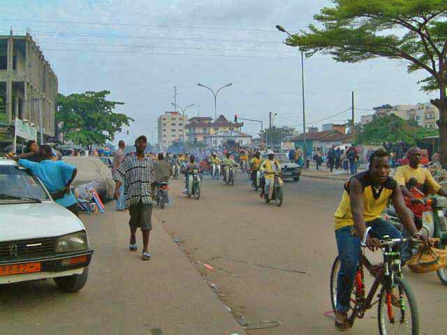 Busy street in Cotonou, Benin